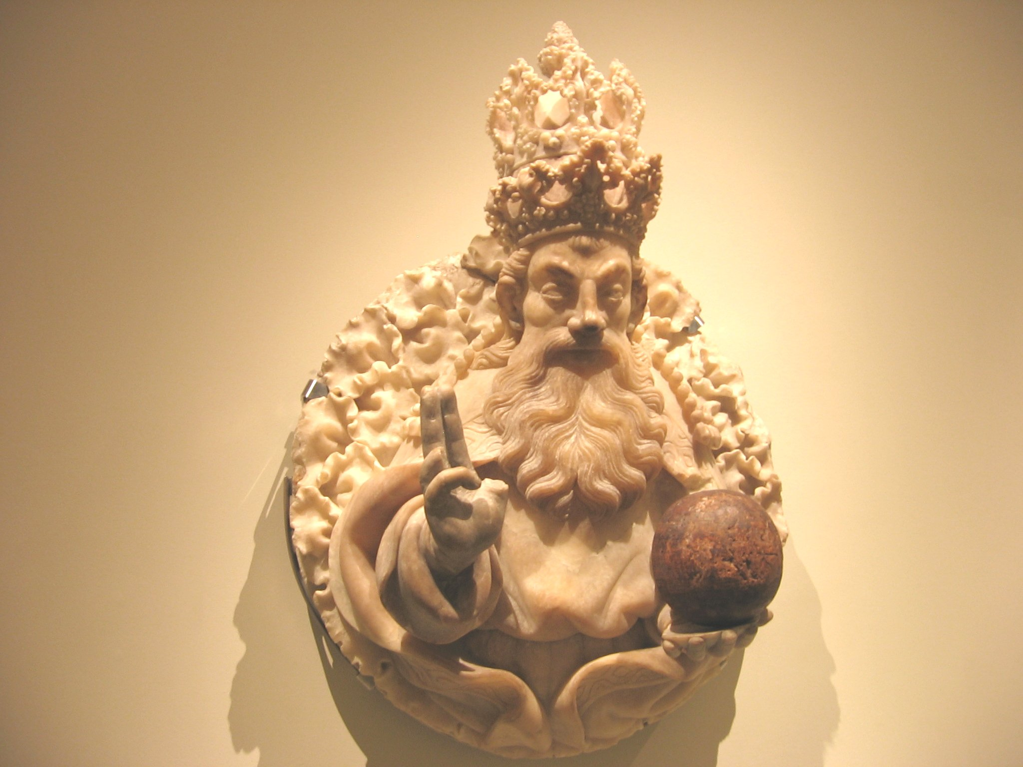 Pere Johan: Salvador (1435-45), MNAC, Barcelona.